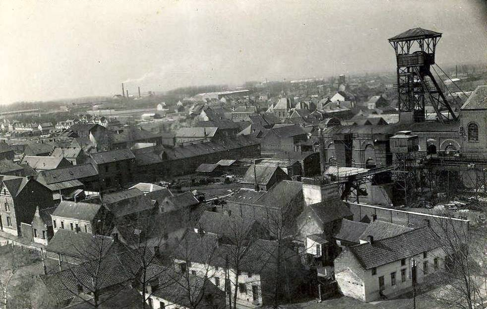 Photo de l'ancienne fosse n° 1 de Crespin aujourd'hui disparue.